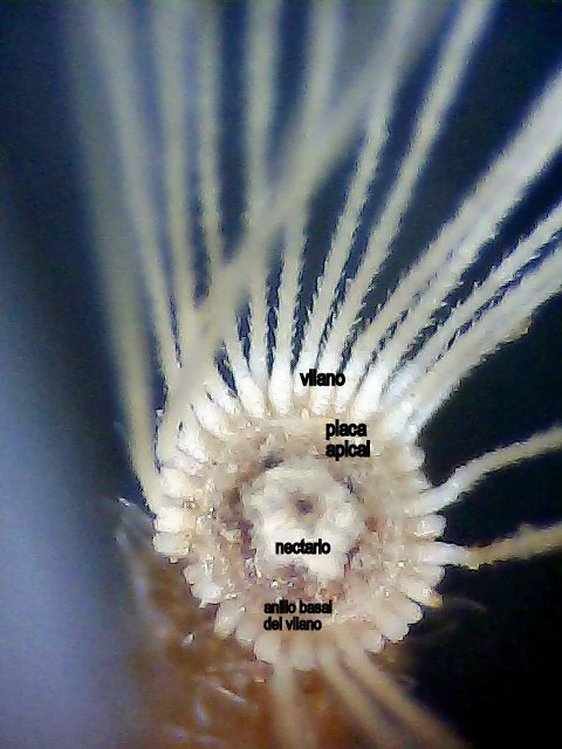 Dittrichia viscosa (Olivarda) - Cipsela suelta: vista apical con anillo basal del vilano de cerdas escabridas y nectario de la placa apical claramente visibles - Paseo de Parra - Águilas (Murcia, España).